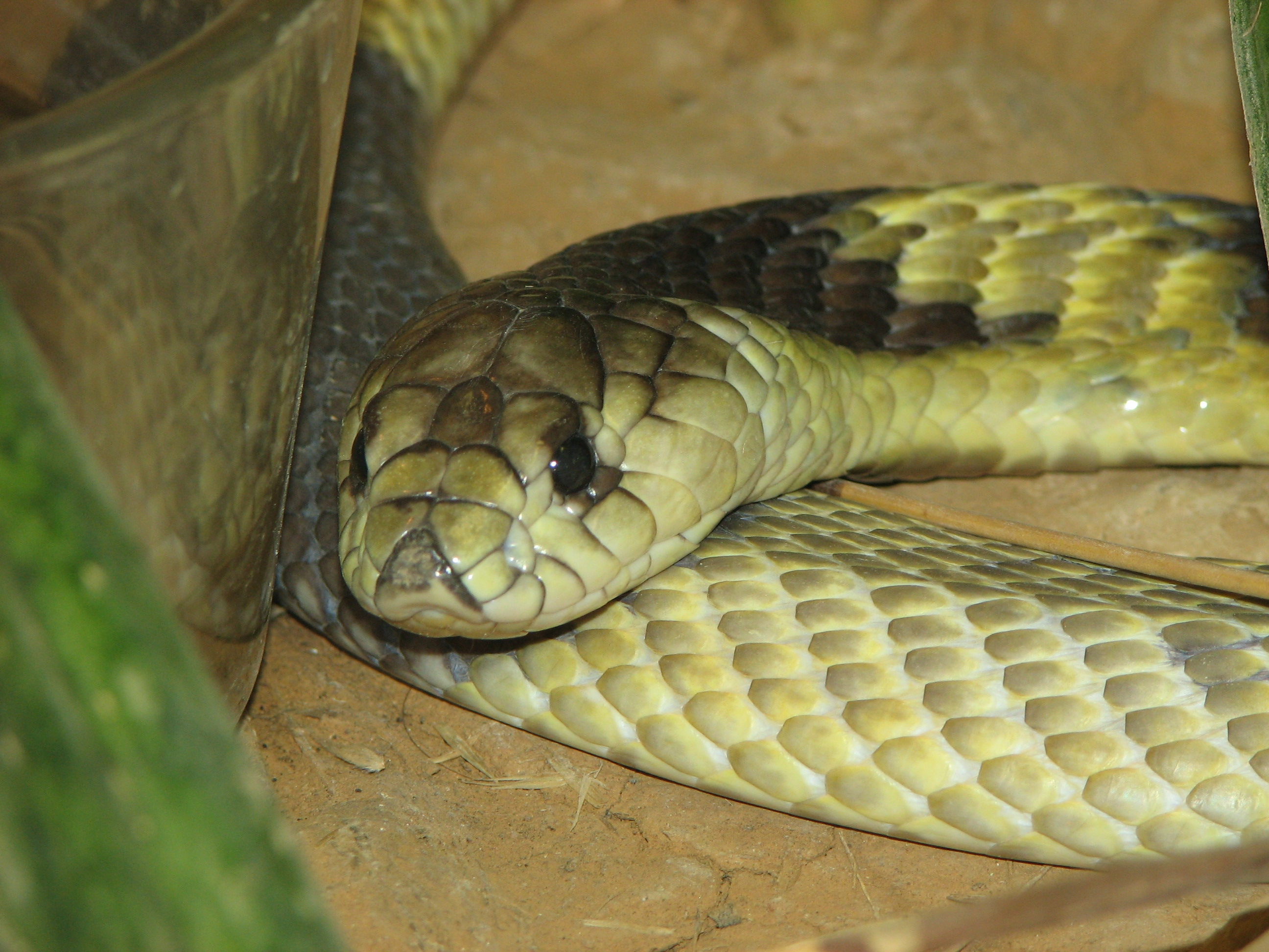 Asp or Egytian Cobra - Naja haje - Taken at Louisville Zoo, Ky